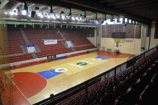 Sportska hala Jezero u Kragujevcu.